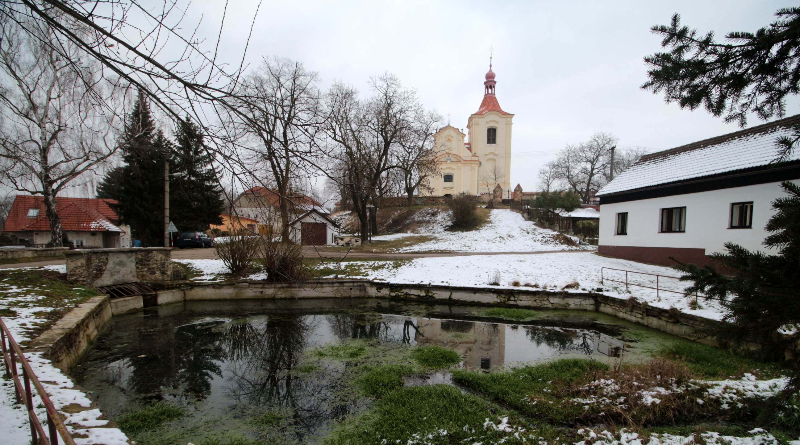 Sluštice